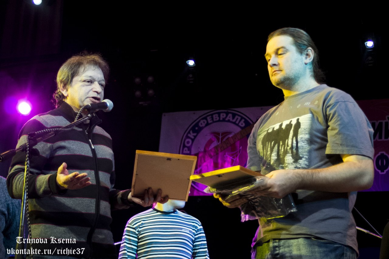 Руководителя ивановской рок-группы "Балтийский чай" жюри награждает дипломом лауреата I степени на фестивале "Рок-Февраль 2012"